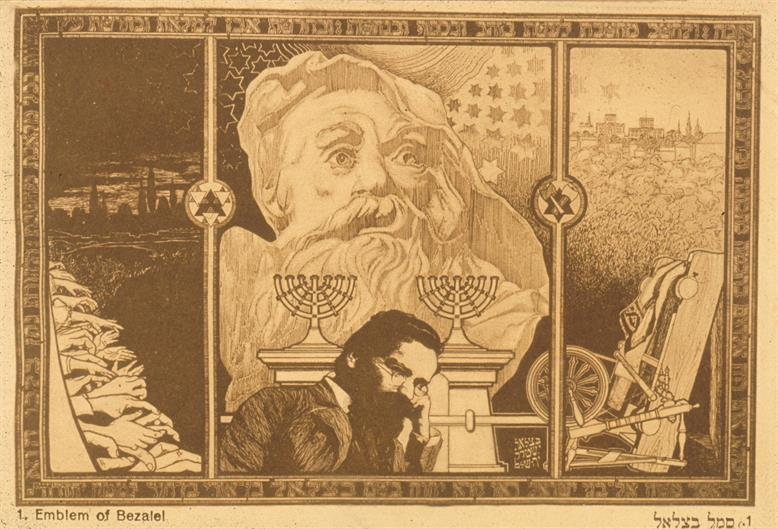 Print